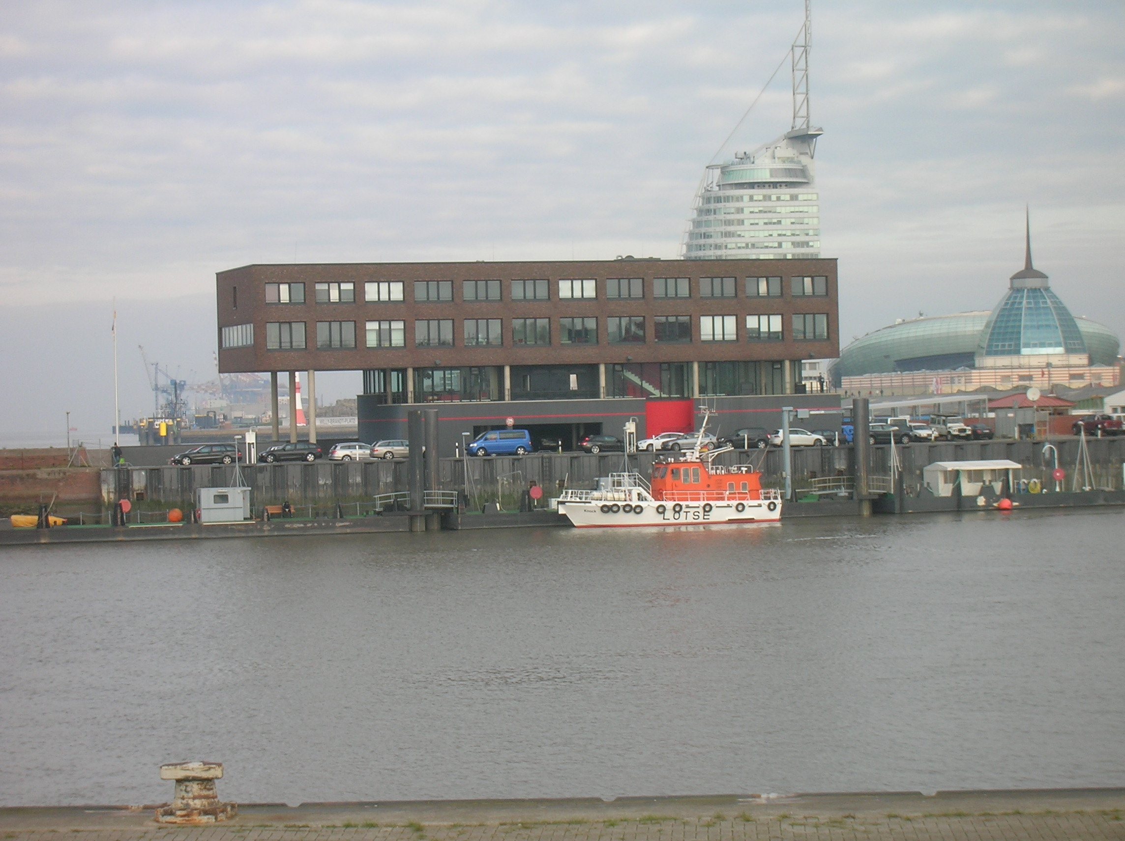 Neubau der Lotsenstation Bremerhaven im Geestevorhafen bei Niedrigwasser.